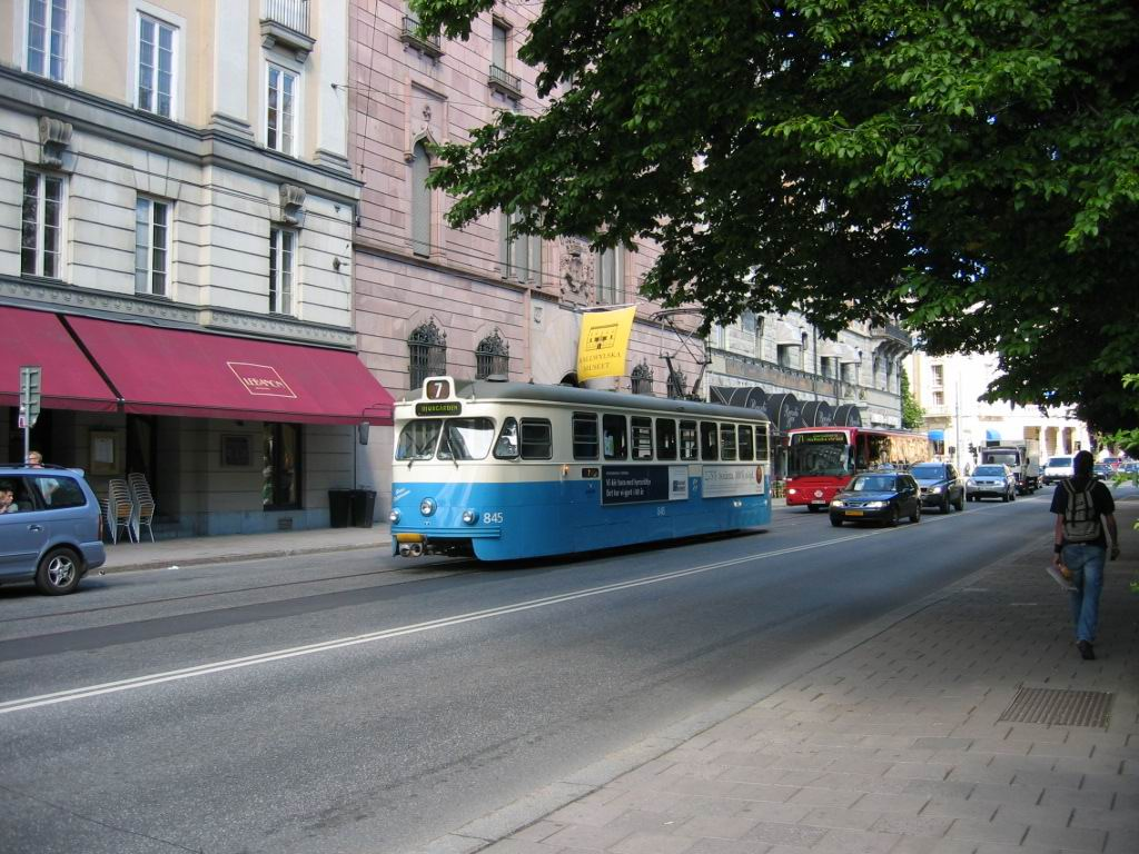 Gothenburg class M29 at Hamngatan in Stockholm.